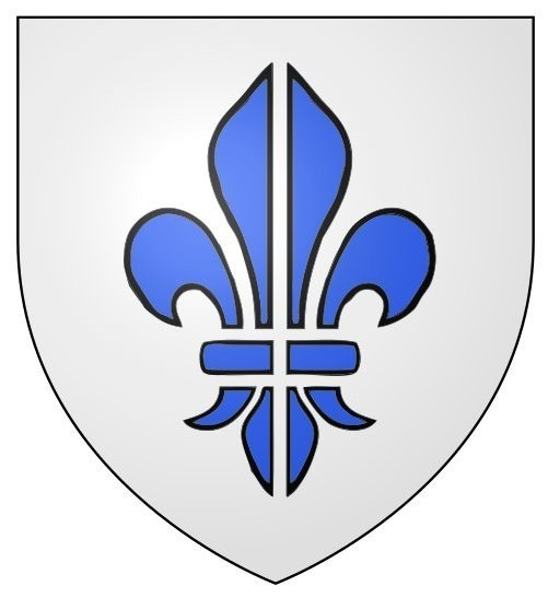 Armes de Moucheron